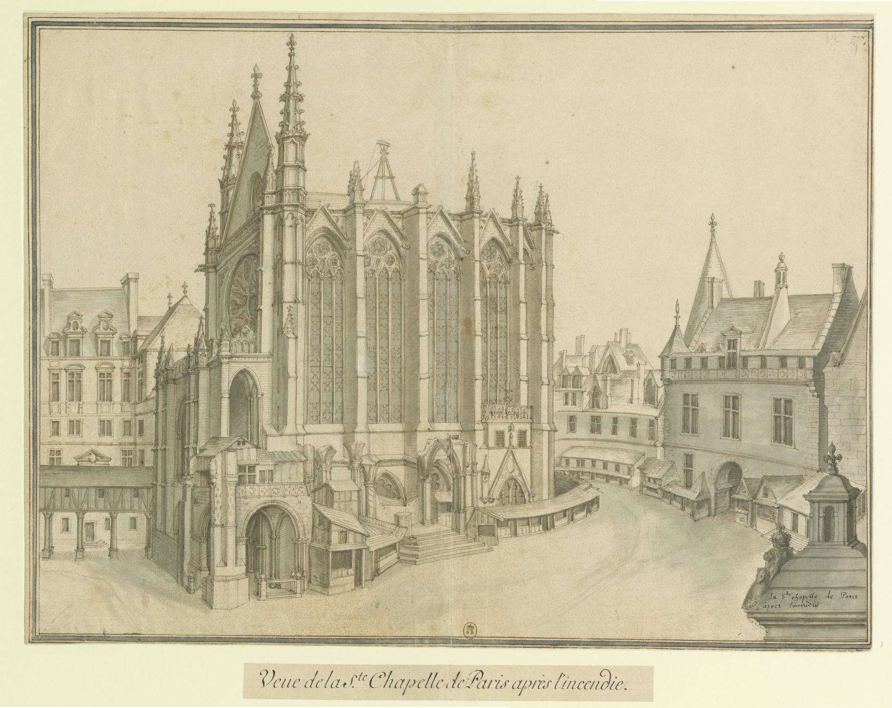 La S.te Chapelle de Paris // apres l'incendie : Veue de la S.te Chapelle de Paris après l'incendie.